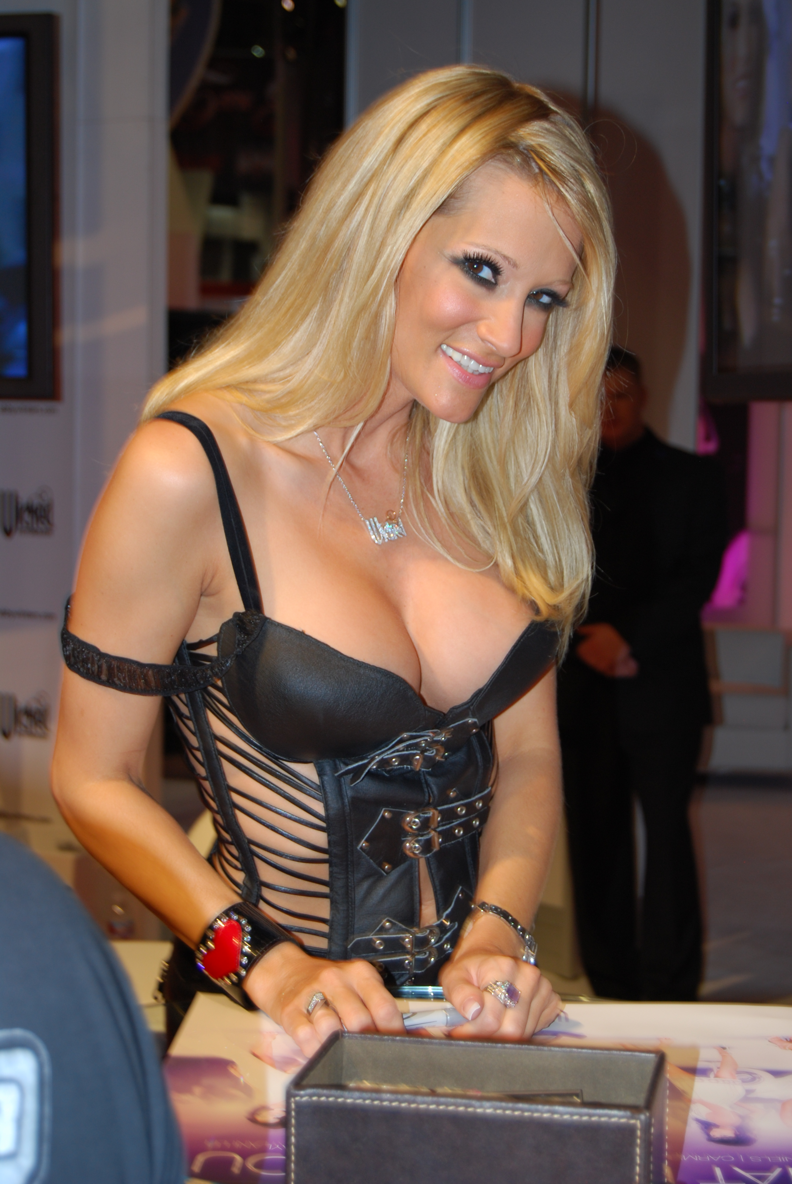 AEE2008_Nikon_Day1 017